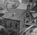 Ausschnitt aus einer Postkarte: Synagoge in Montabaur